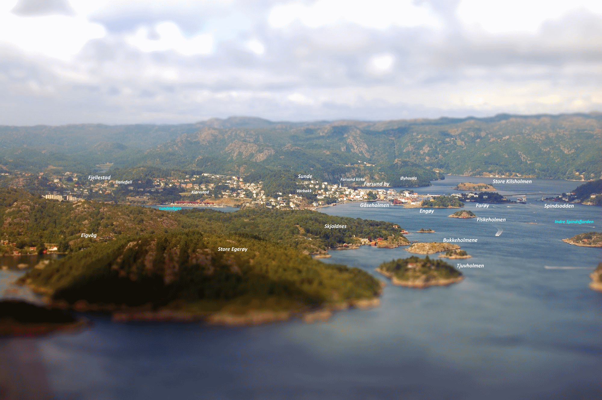 Flyfoto av Farsund. Med navn på områder. Effekt: Tilt-shift